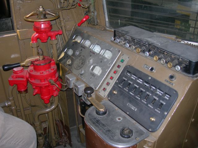 Cabina di guida della E.424.075